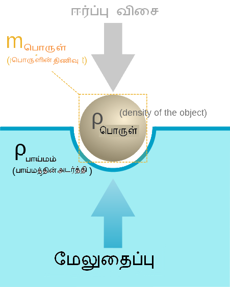 மேலுதைப்பும் பொருள் மிதத்தலும்